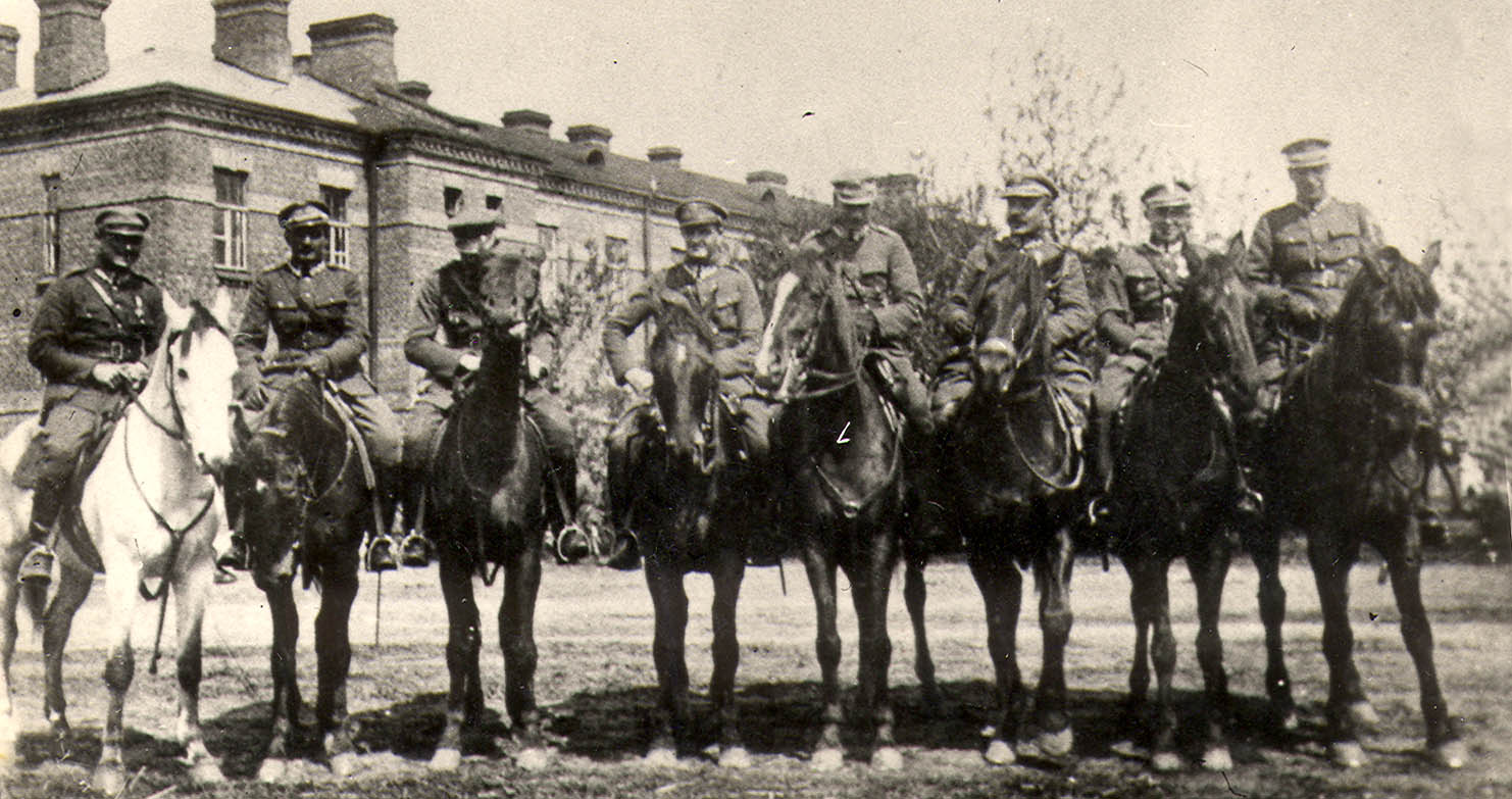 Garnizon Przasnysz 1921, 7 Pułk Ułanów Lubelskich